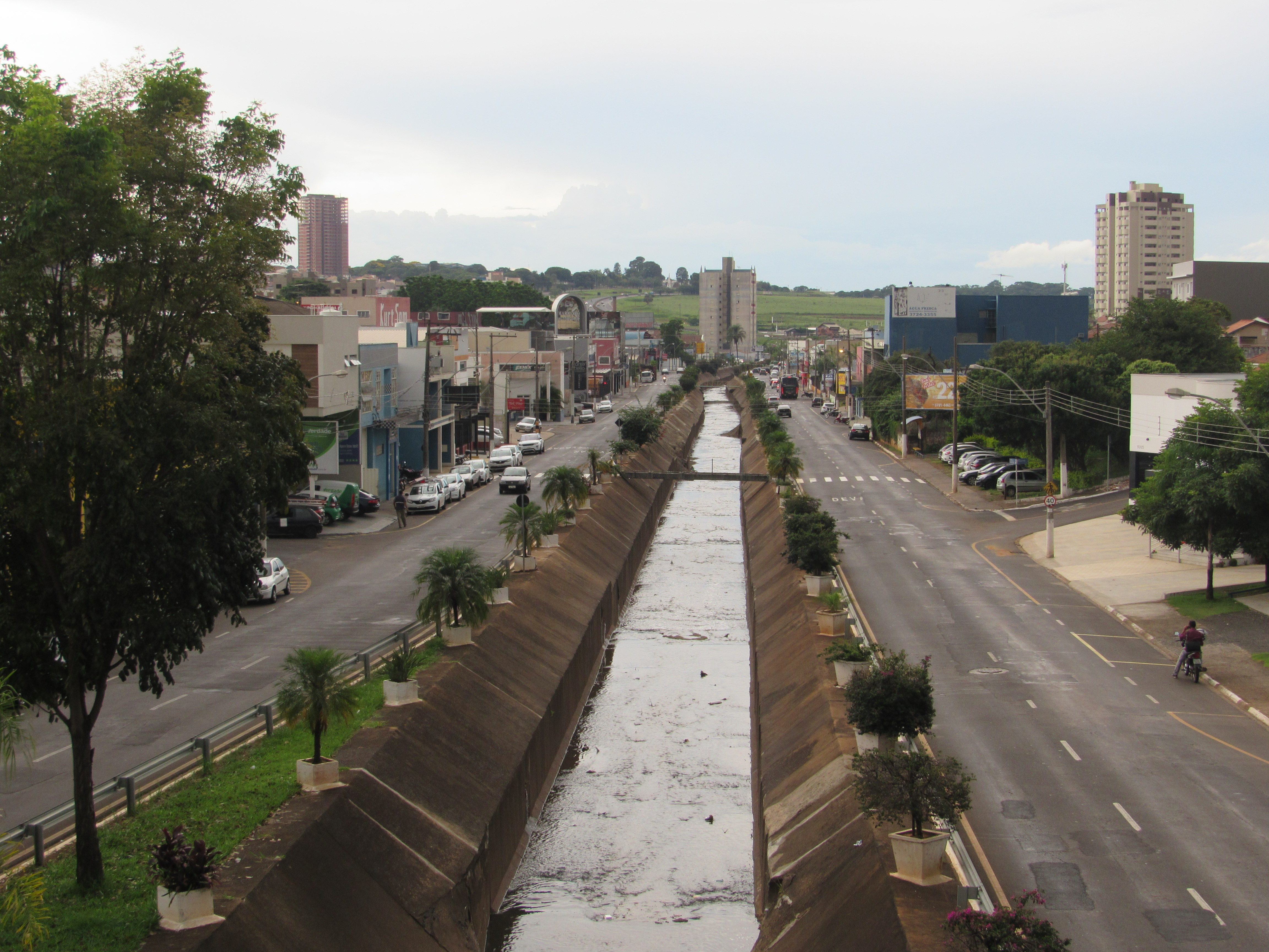 Avenida Antônio Barbosa Filho e Córrego dos Bagres, Franca (SP), Brasil